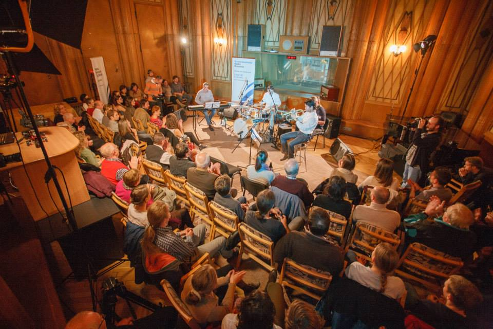 Tonight Jazz Quartet a Kottában